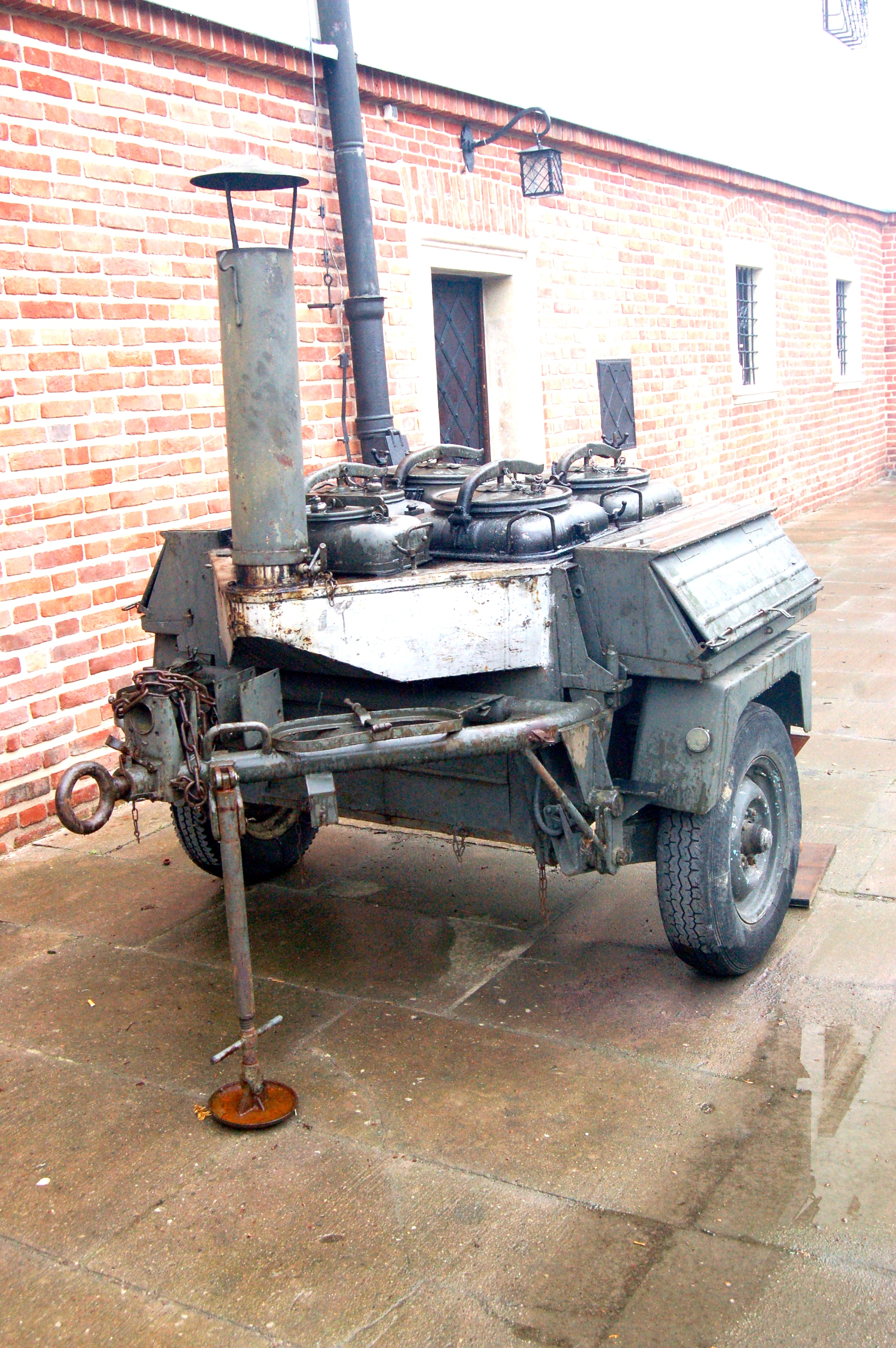 Gulaschkanone KP-340 hinter Schloss Baranow, Polen